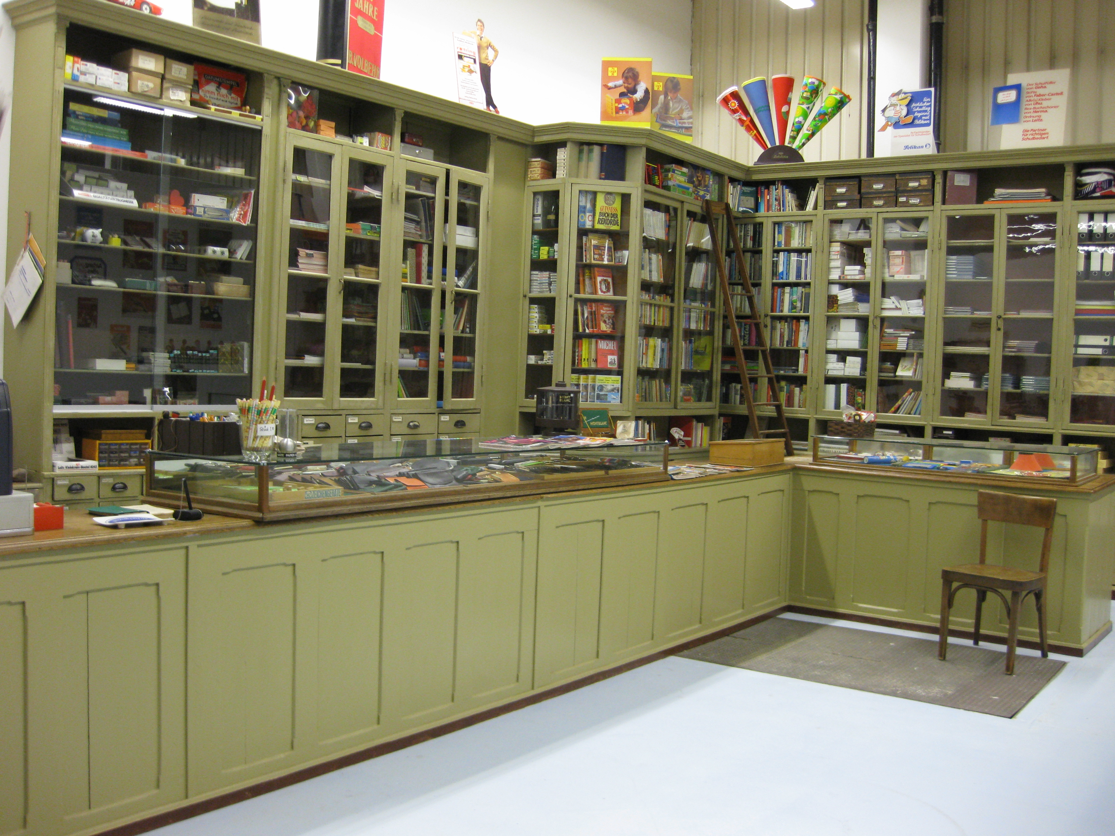 Depot Stadtmuseum Kiel - Wiederaufbau Schreibwarenladen Vollbehr